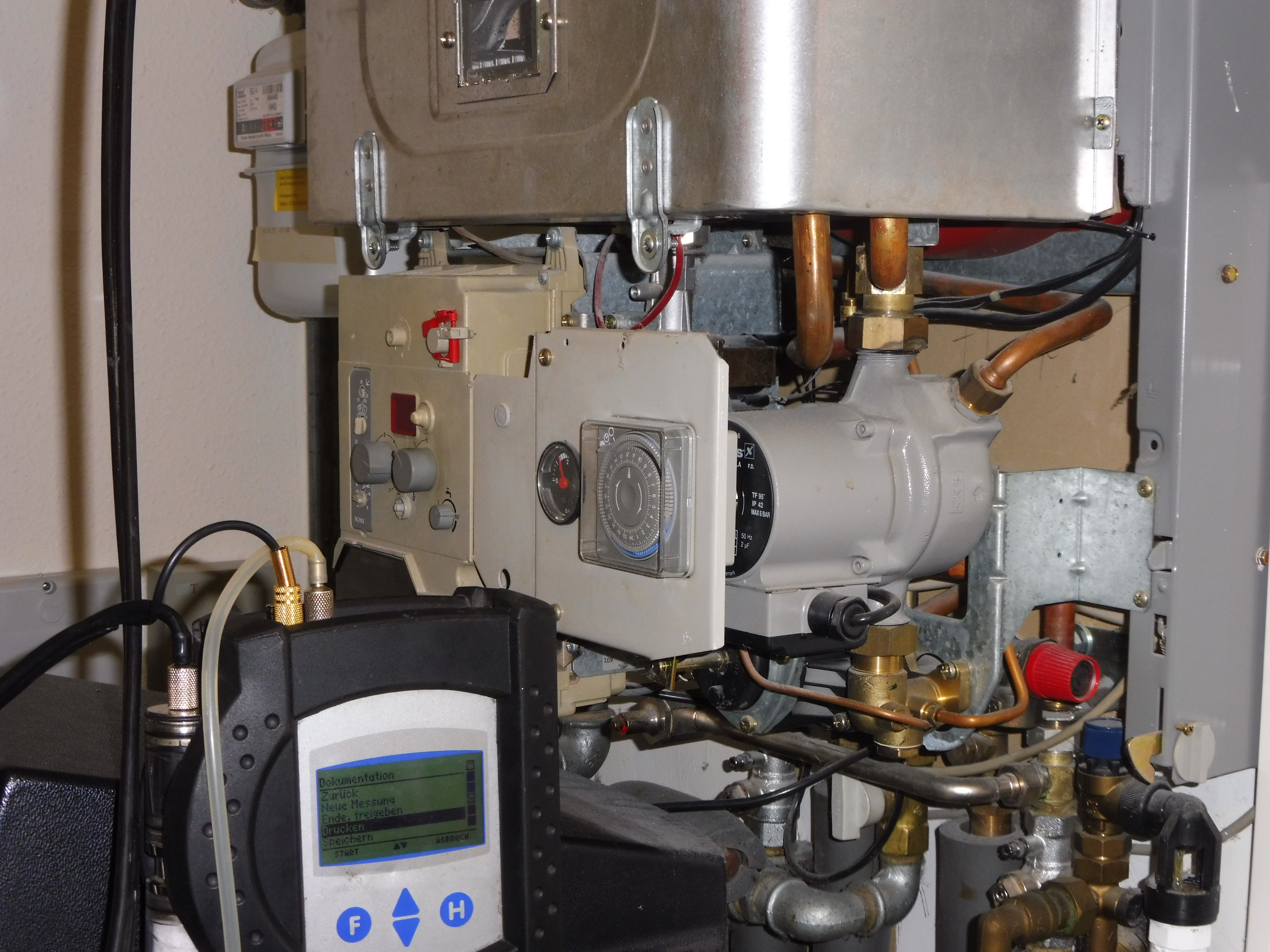 Kontrollmessung einer Hausheizung